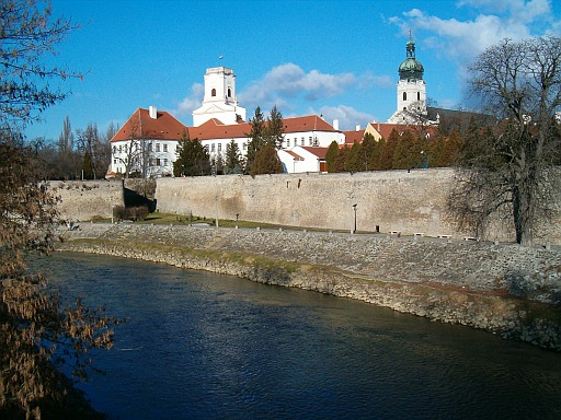 Gyor